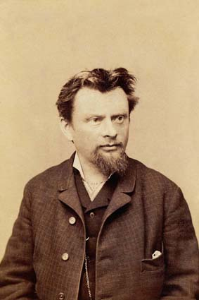 Autoportrét